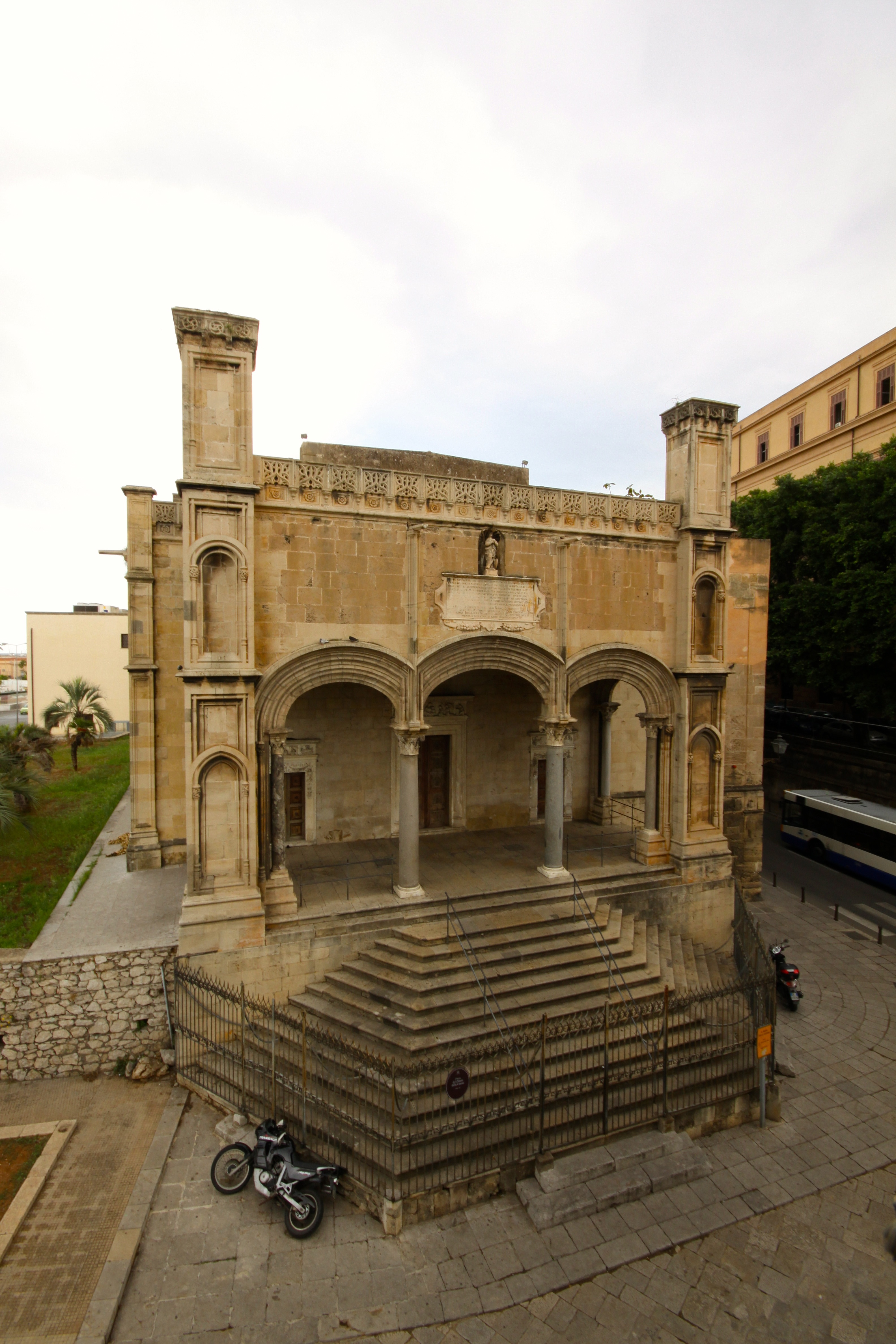 Santa Maria della Catena (Palermo)